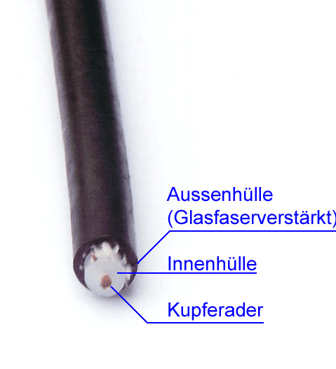 Schnitt durch ein Linienleiterkabel mit Erläuterungen (ist etwa Originalgröße)